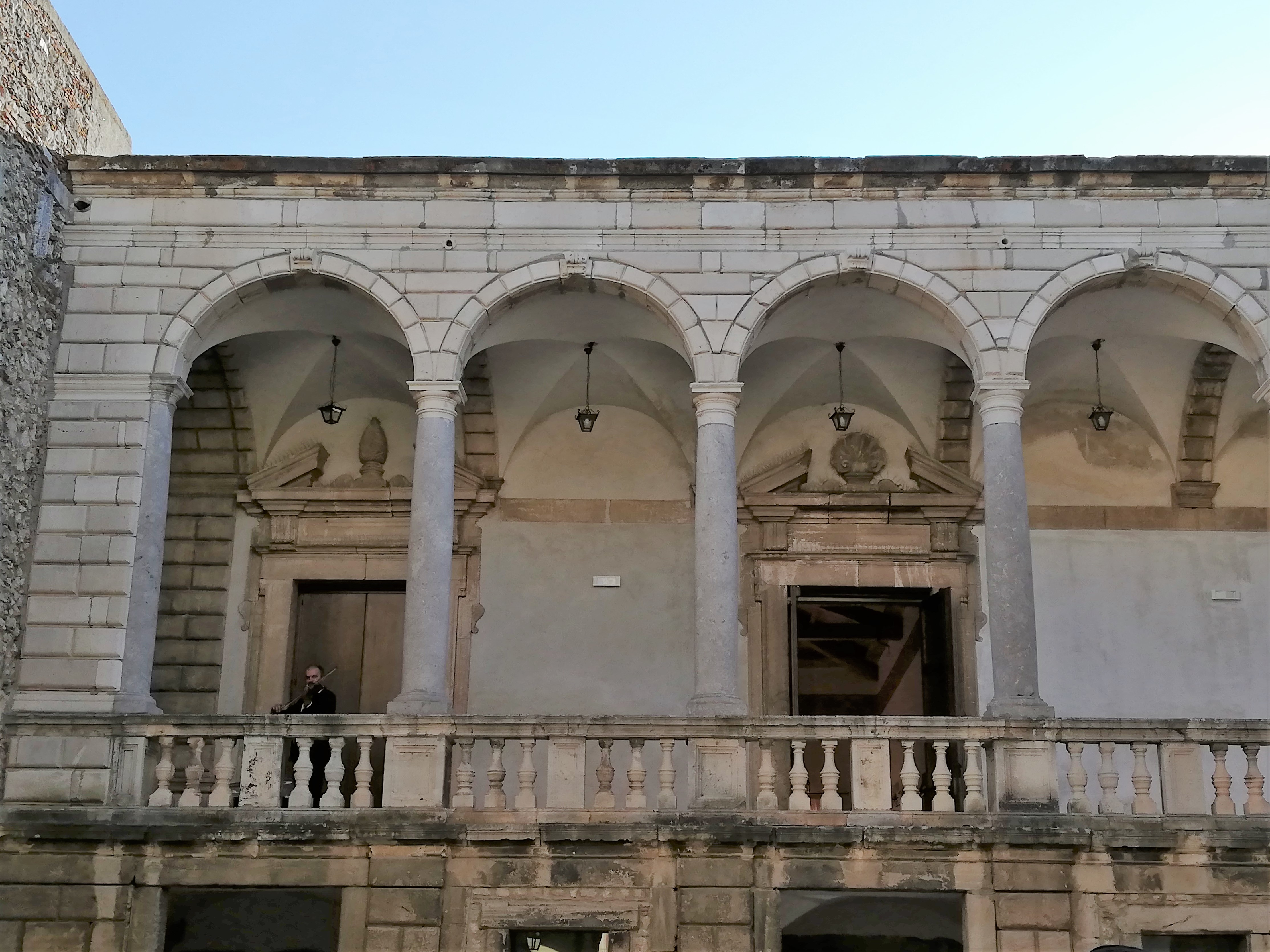 Loggia sul cortile interno.